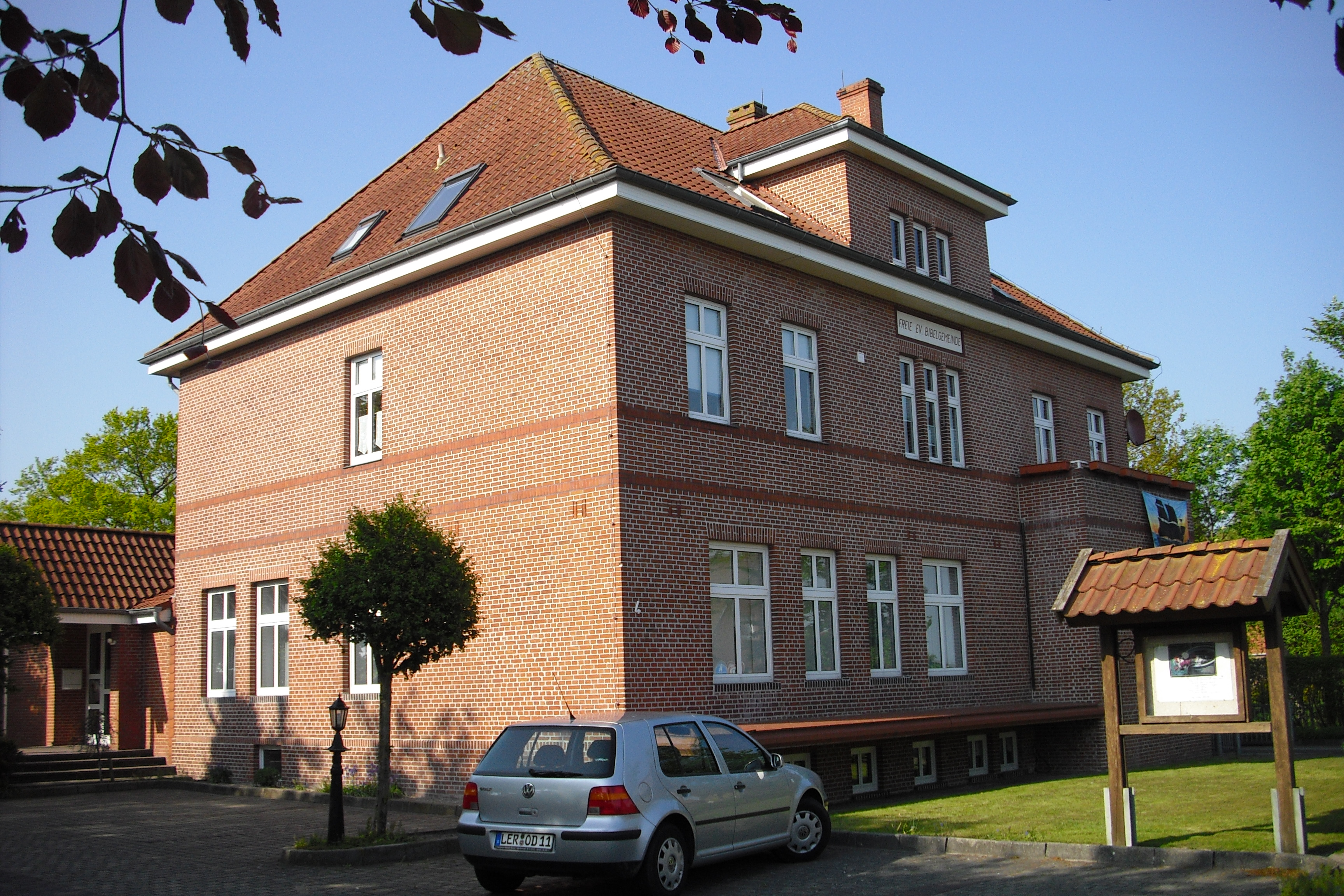 Gemeindezentrum der freikirchlichen Bibelgemeinde Boen (bei Wymeer / Ostfriesland)